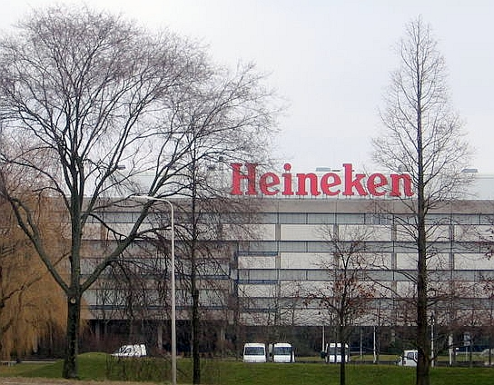 Zoeterwoude and surroundings